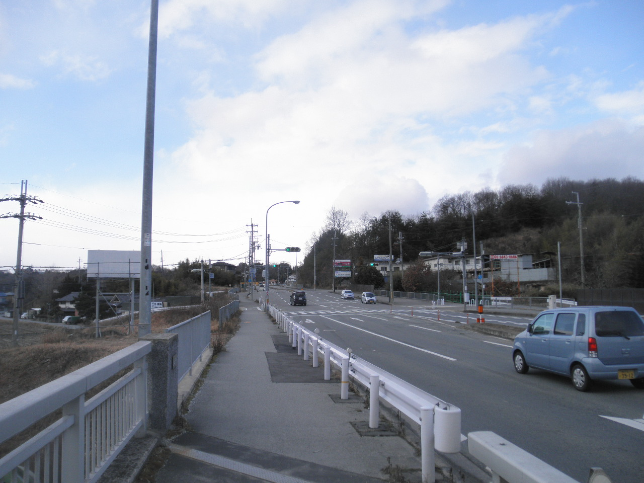 兵庫県神戸市北区道場町塩田 国道176号